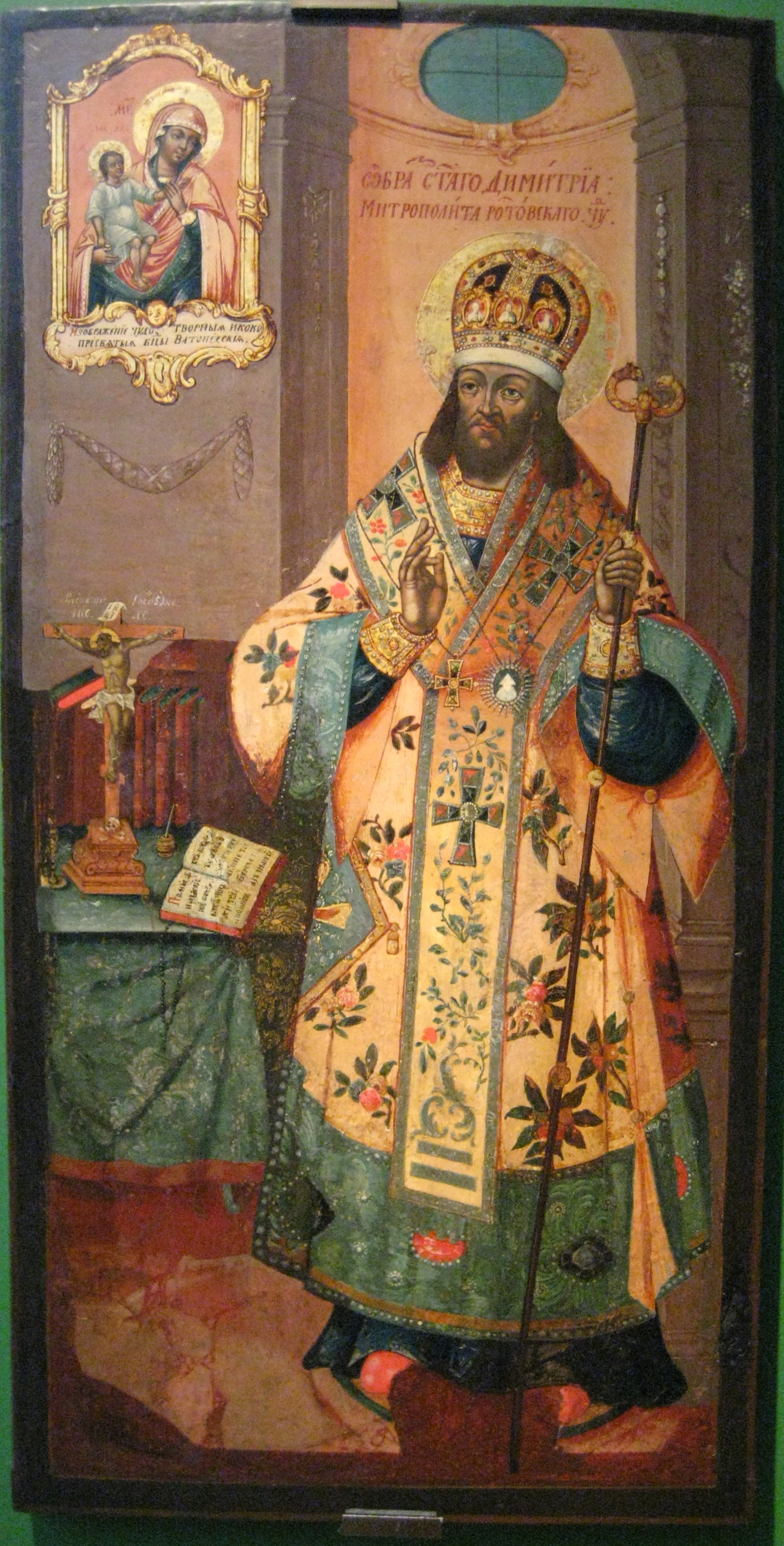 Димитрий Ростовский. 2-я пол. 18 века. Парсуна, ГИМ